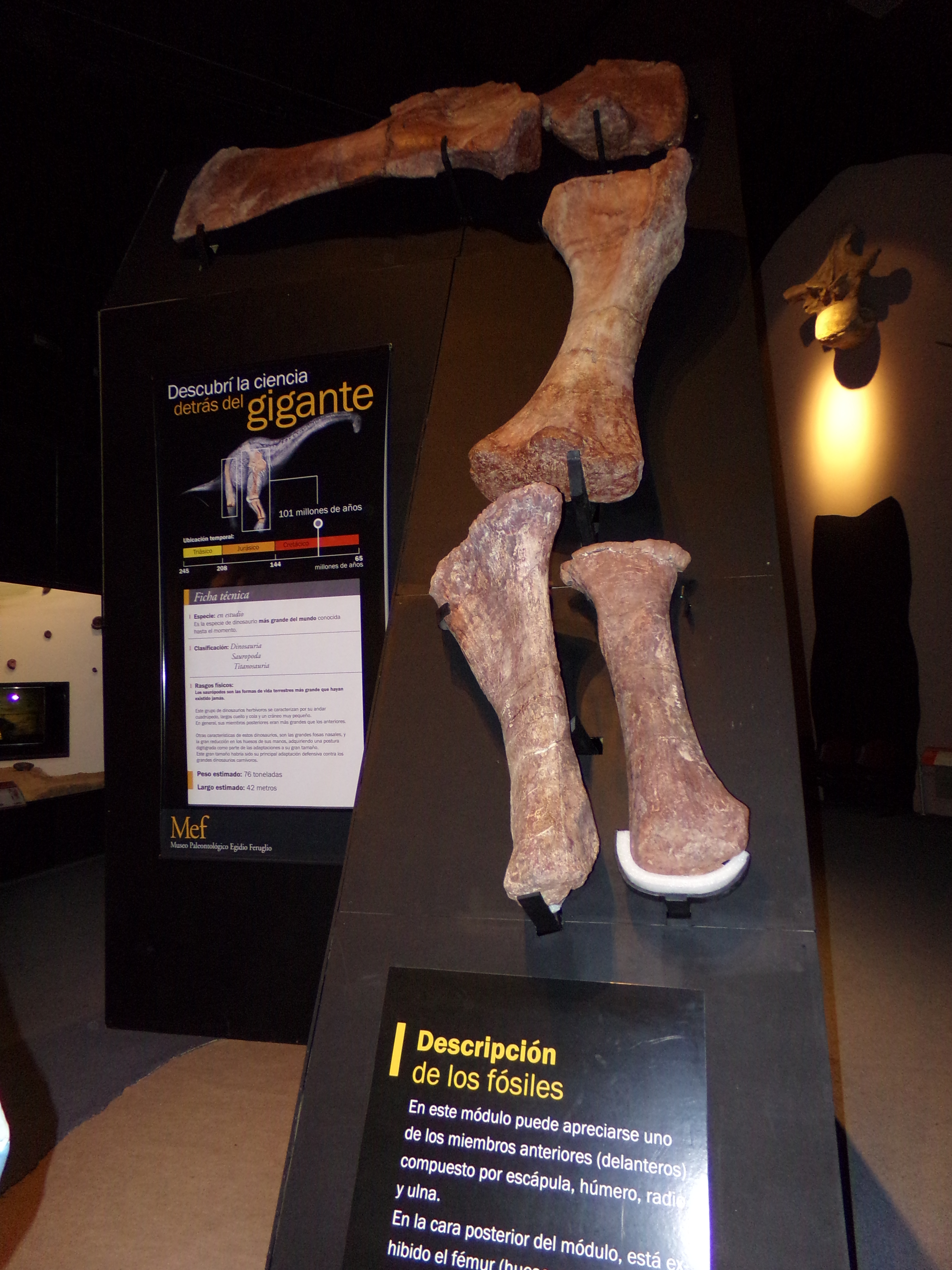 Fósiles del titanosauria del Chubut en el Museo Egidio Feruglio de Trelew